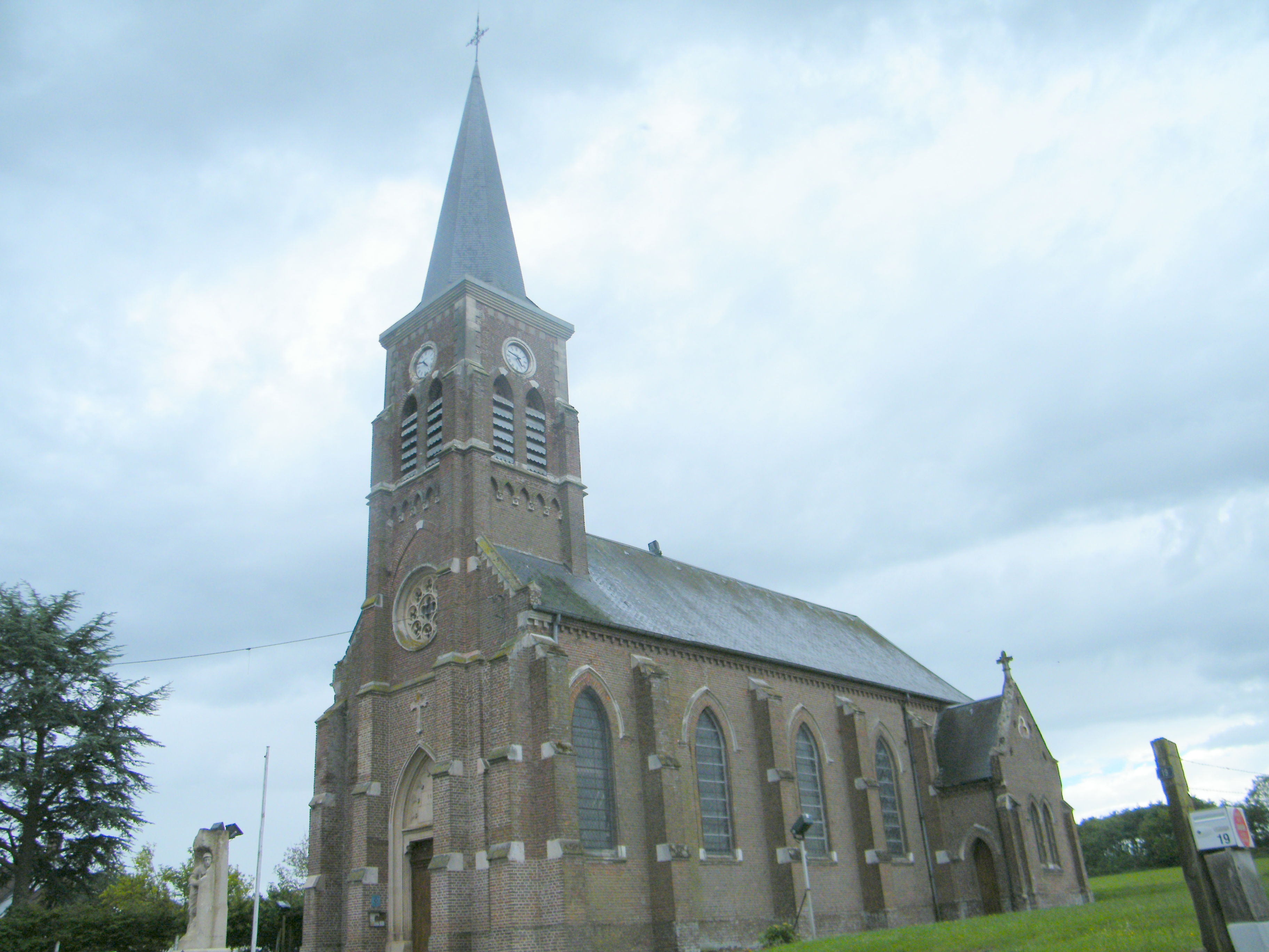 Église Saint-Quentin d'Arry (Somme), France.